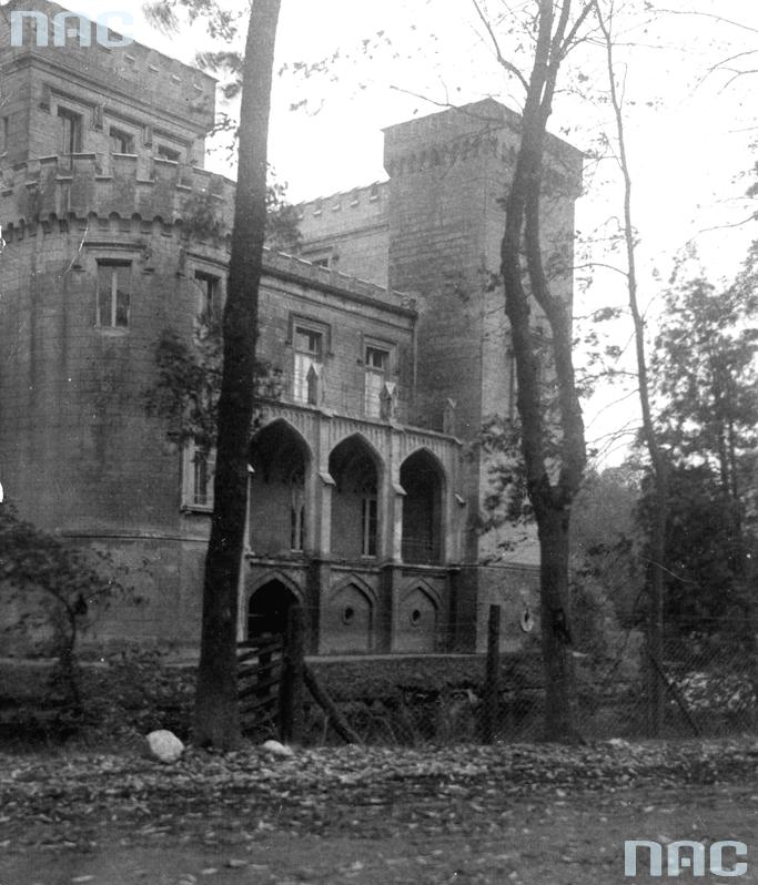 Zamek Kórnik - fot. archiwalna